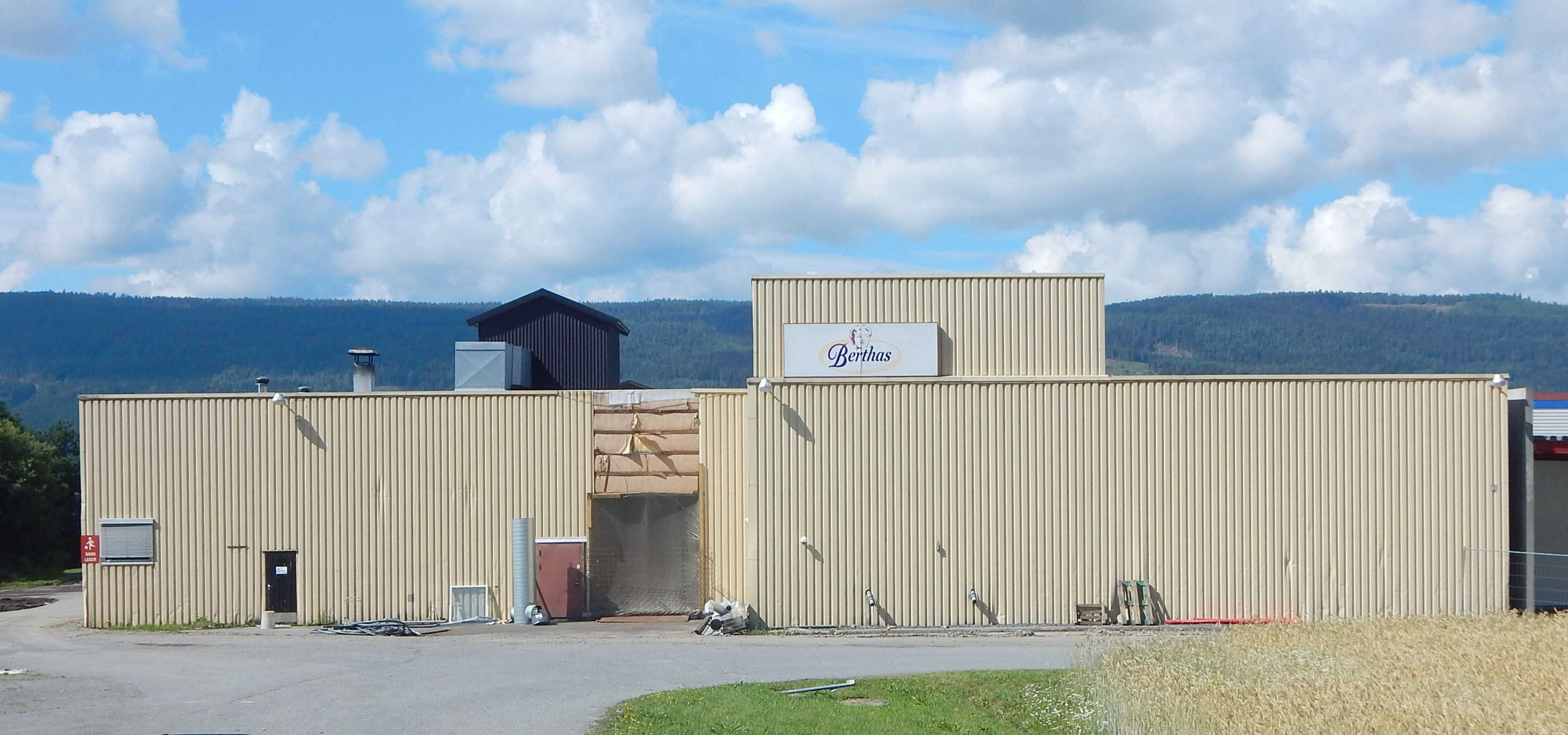 Berthas bakerier på Granum i Søndre Land